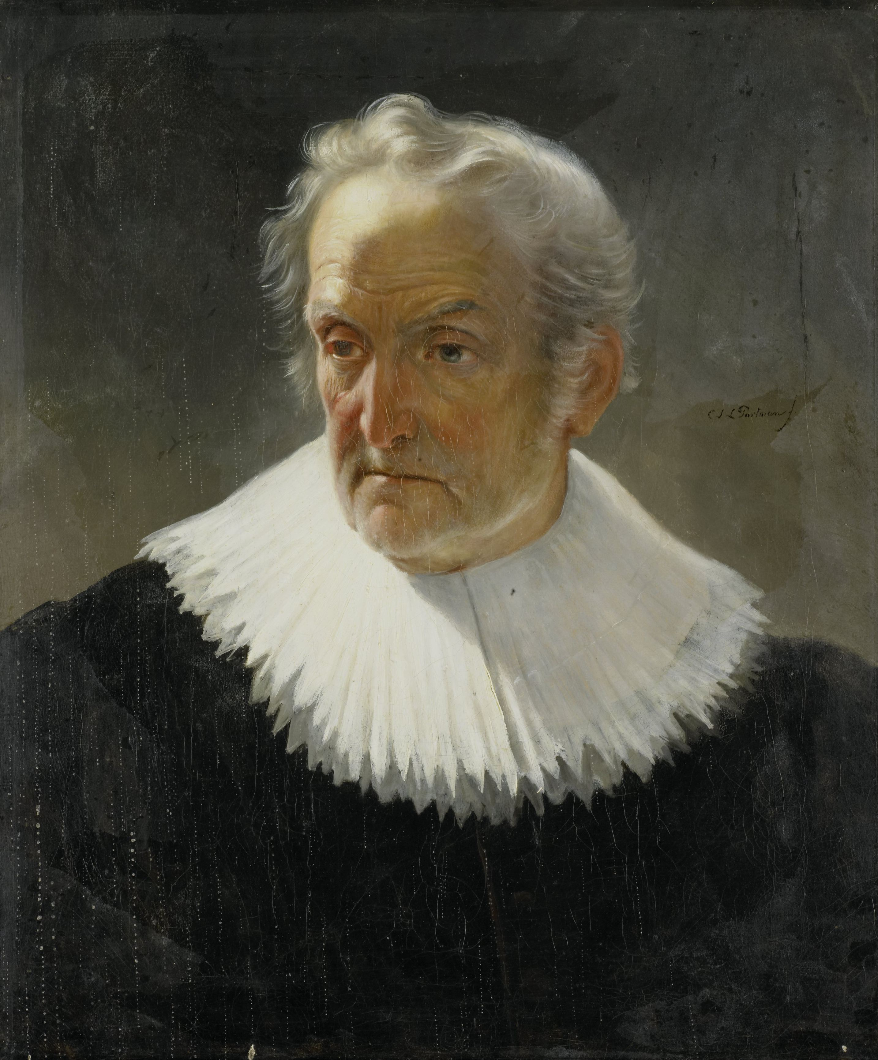 Buste van een oude man in zeventiende-eeuws kostuum, het hoofd iets naar links gekeerd.